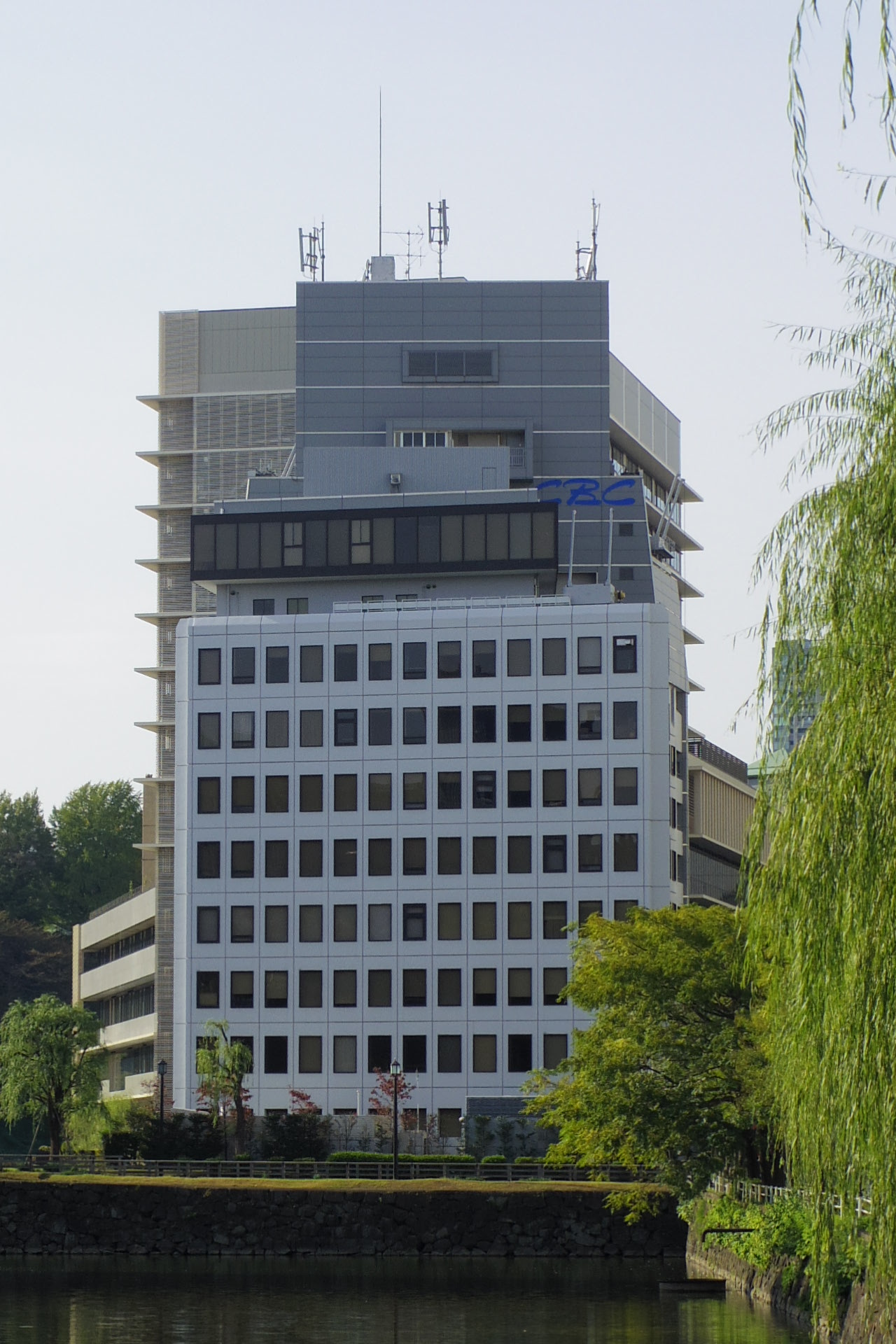 中部日本放送（CBC）東京支社がある千代田会館（東京都千代田区九段南）。2015年11月1日、北の丸公園近くで撮影。